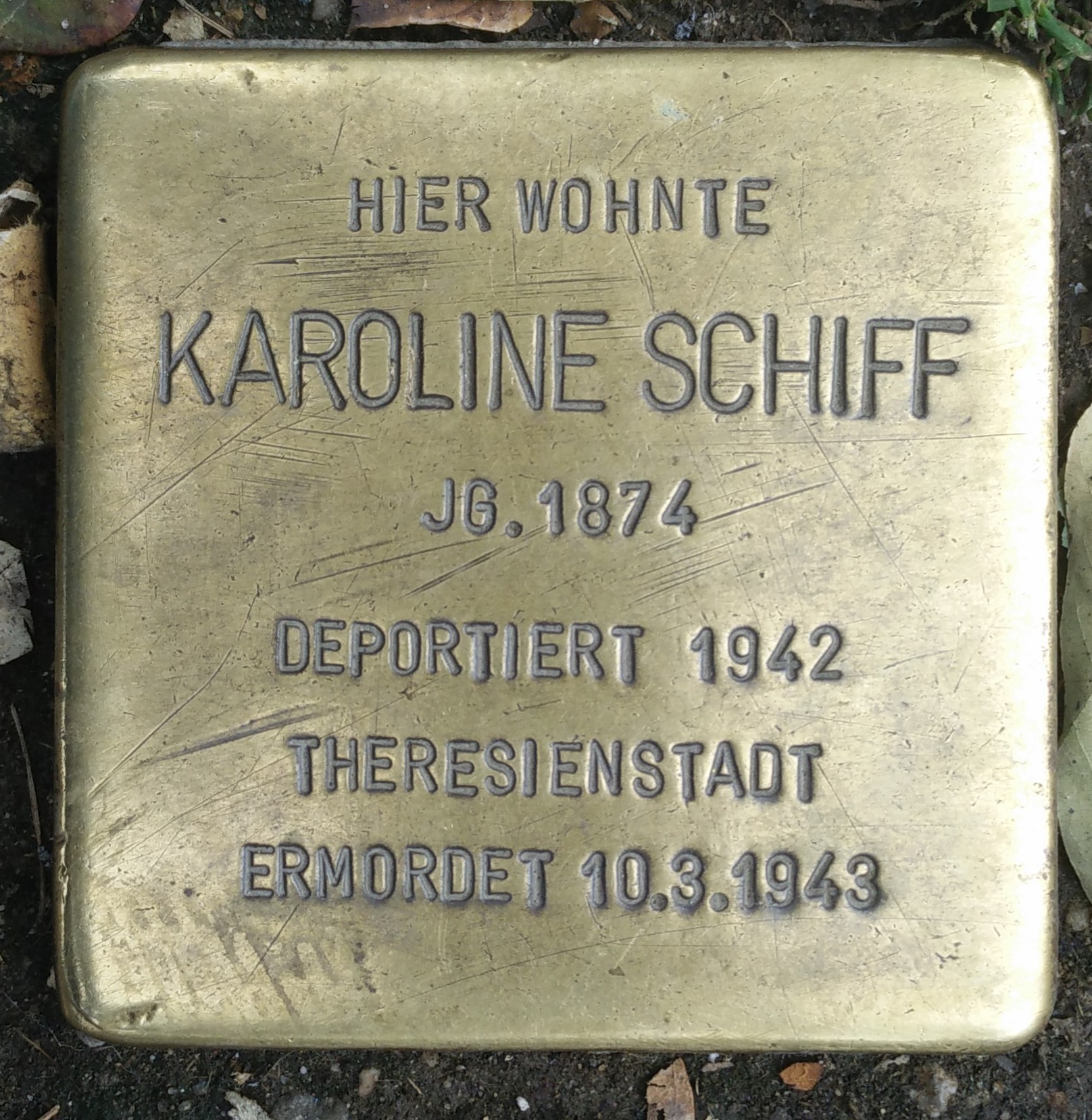 Bad Vilbel, Stolperstein Karoline Schiff